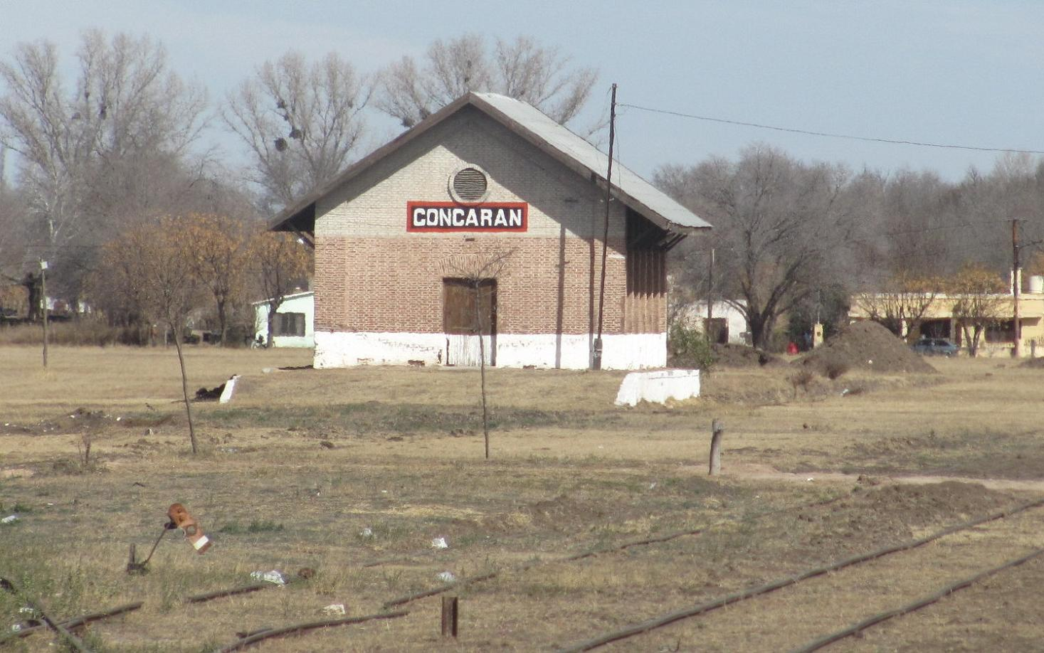 Estación Concarán, San Luis, Argentina.